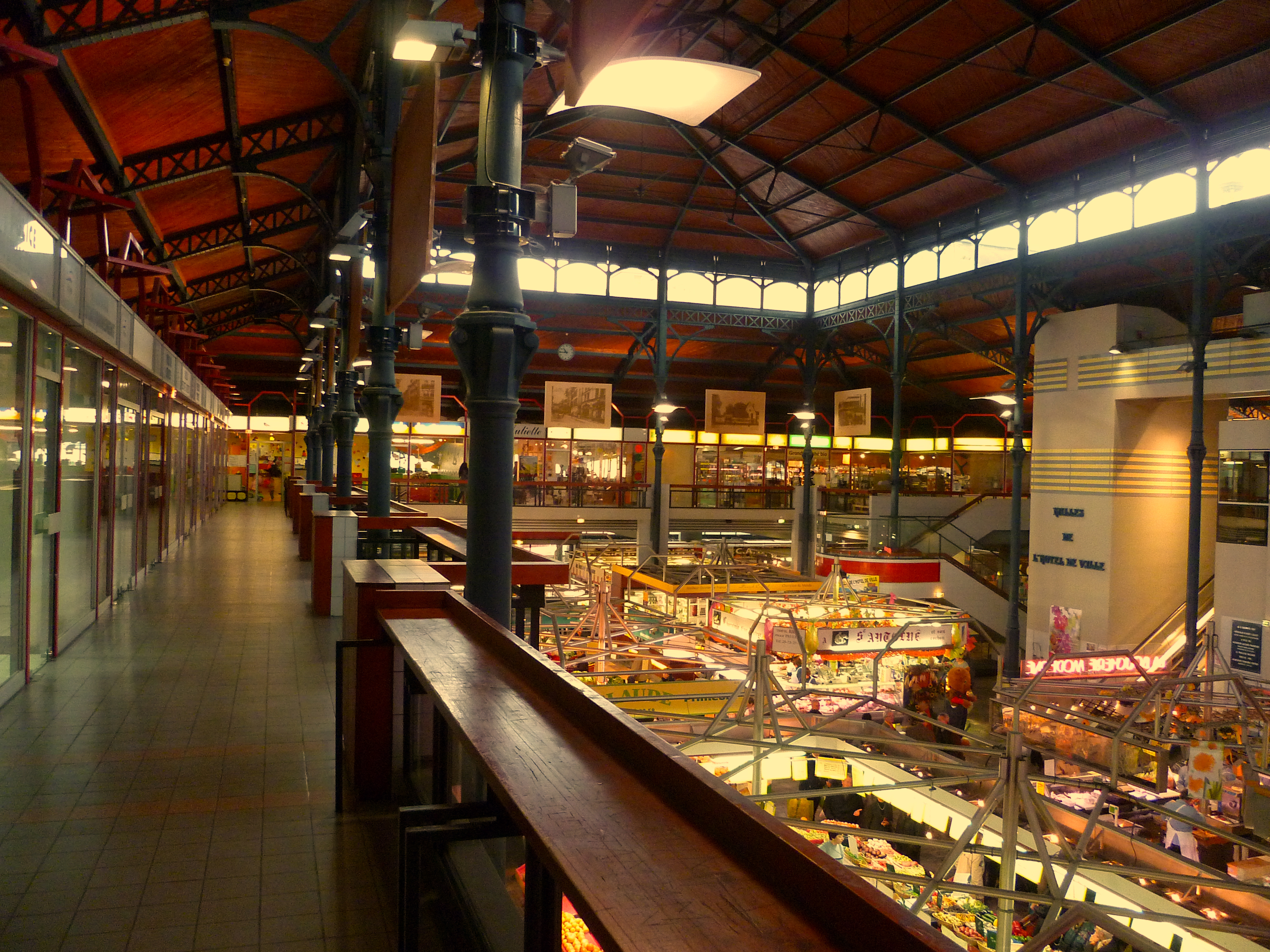 Halles de l'Hôtel de Ville à Troyes, (Aube, France).